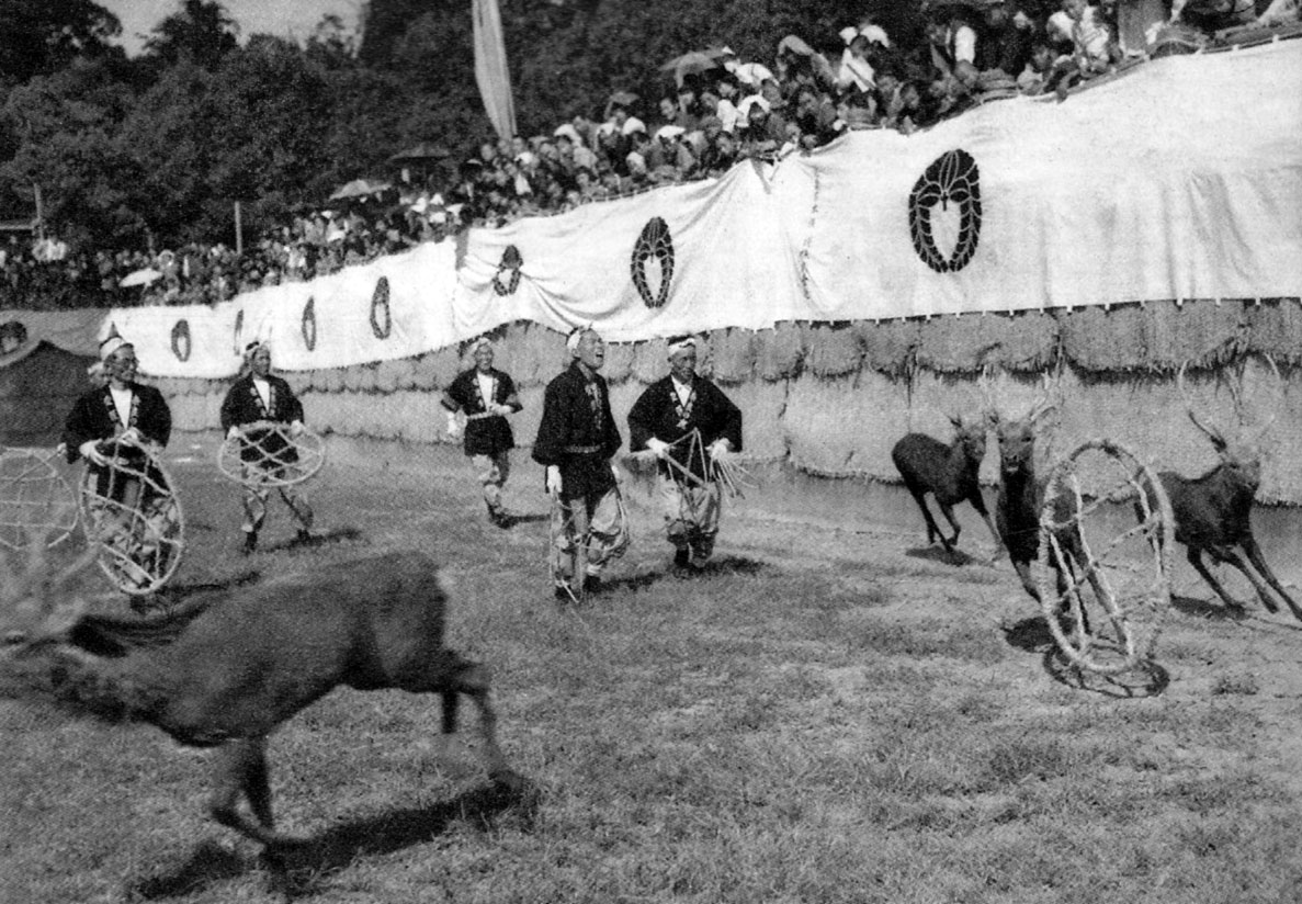 春日大社で、13年ぶりに復活した「鹿の角切り」